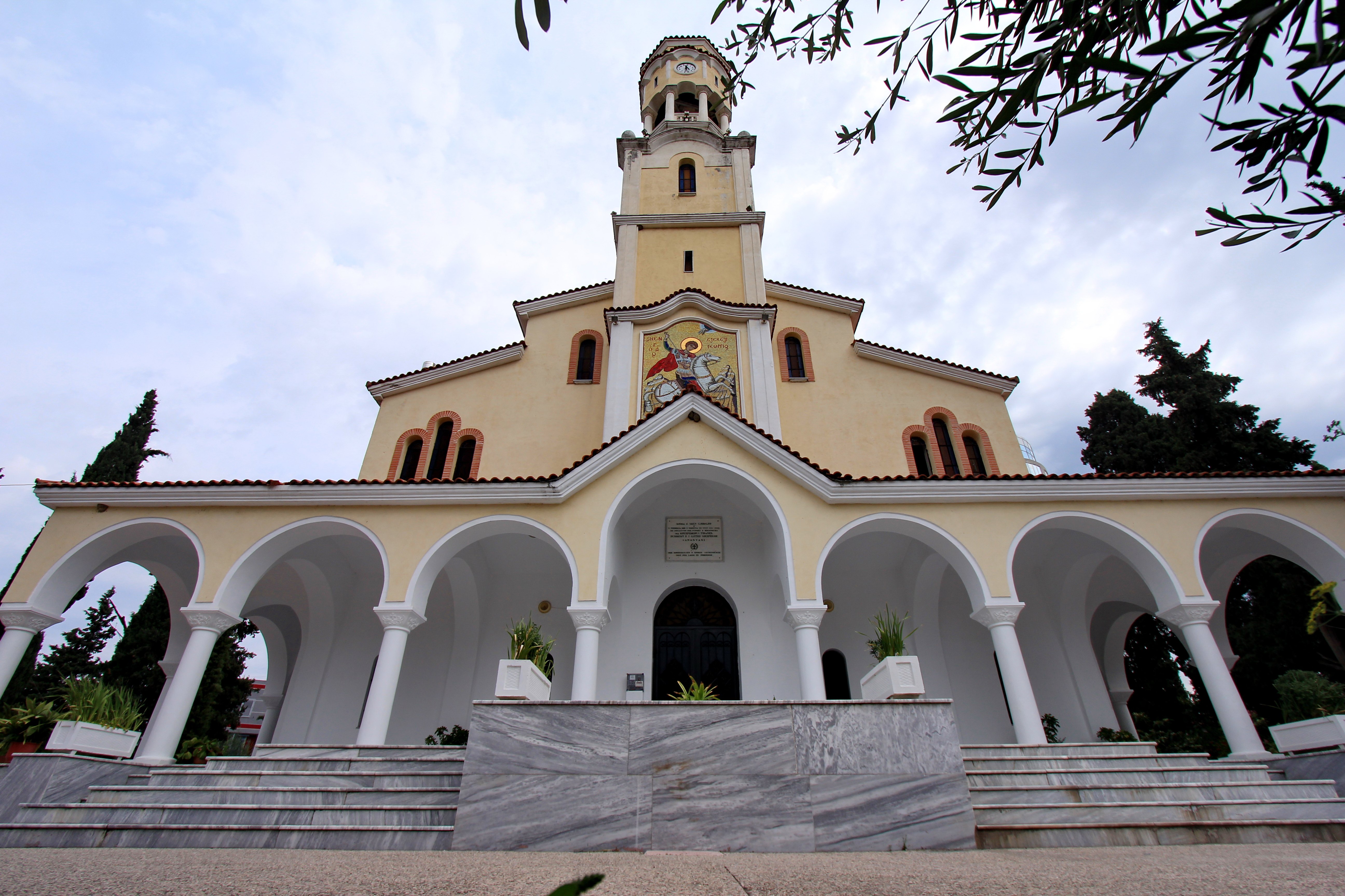 Kisha e Shen Gjergjit (Strumë)